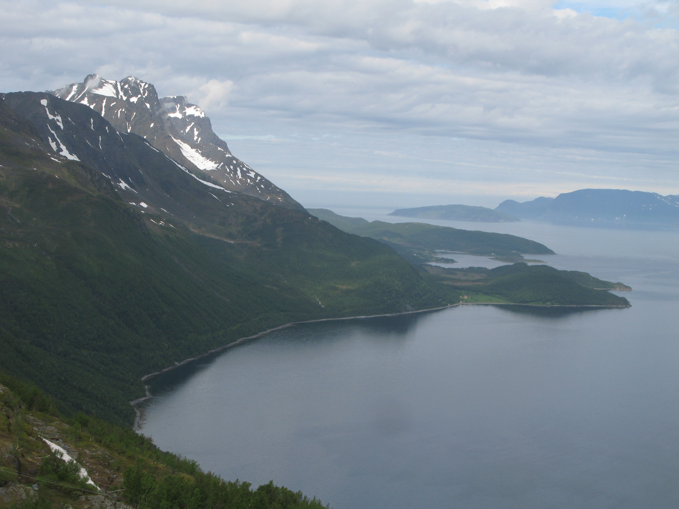 Norveški fjord na poti proti Aaltu.